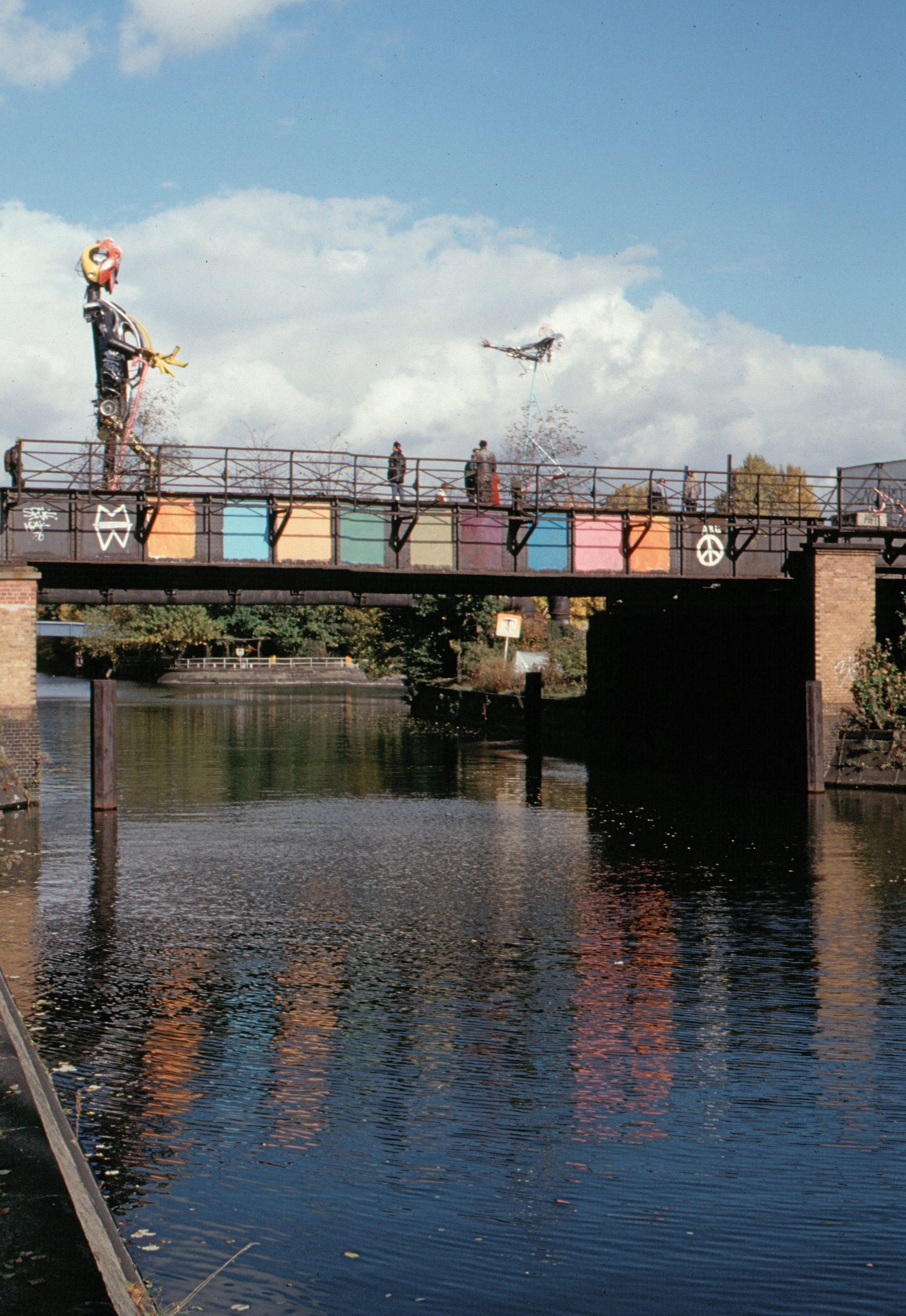 Bahnbrücke über den Landwehrkanal in Kreuzberg